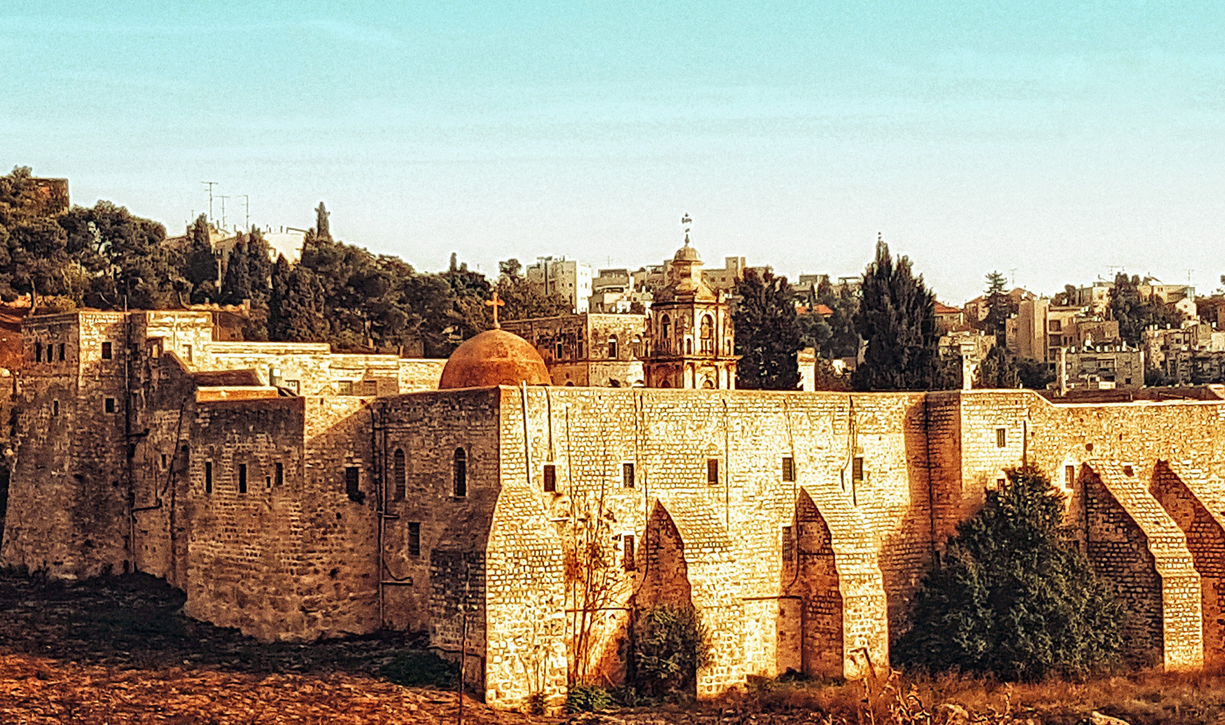 מנזר המצלבה